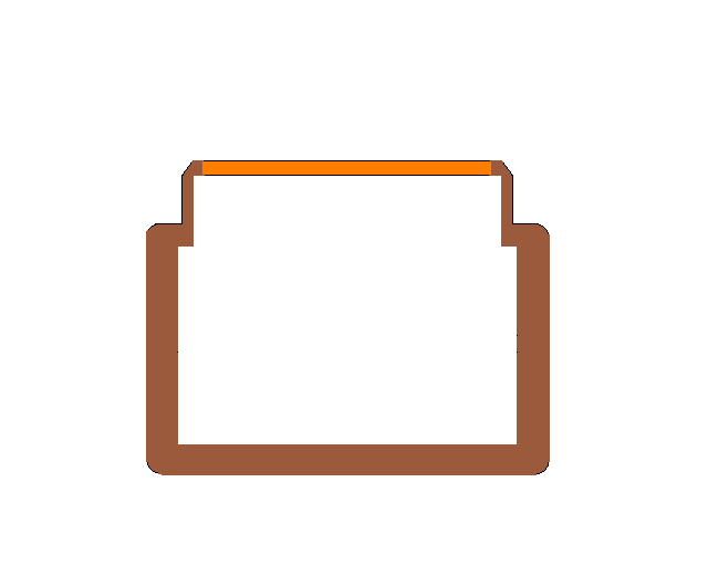 Querschnitt durch den Laderaum eines Schiffs mit großem Decköffnungsgrad